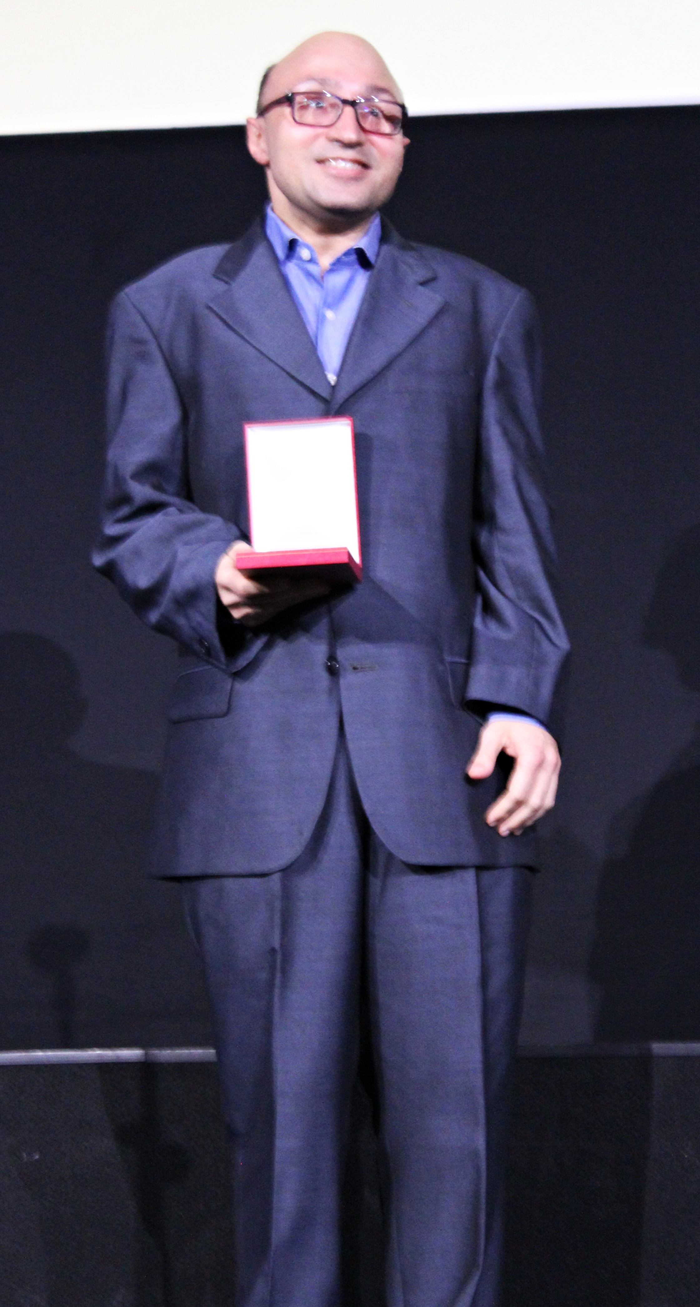 El actor español Jesús Vidal muestra la Medalla del Círculo de Escritores Cinematográficos a actor revelación del año 2018 recibida por su interpretación en la película Campeones.